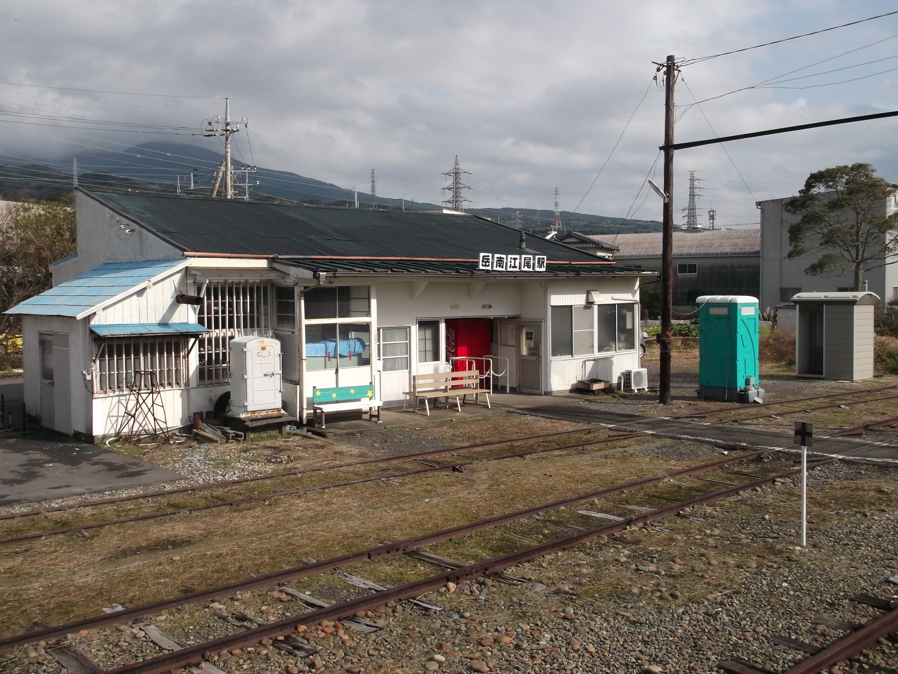 岳南鉄道岳南江尾駅ホームから見た駅舎